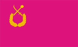 Прапор Великобагачанського району